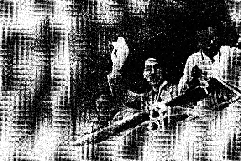 見送りに応える山本祥吉（サイベリア丸甲板より）